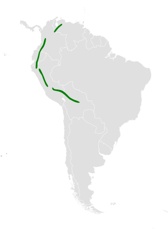 Notiochelidon flavipes distribution map, based on